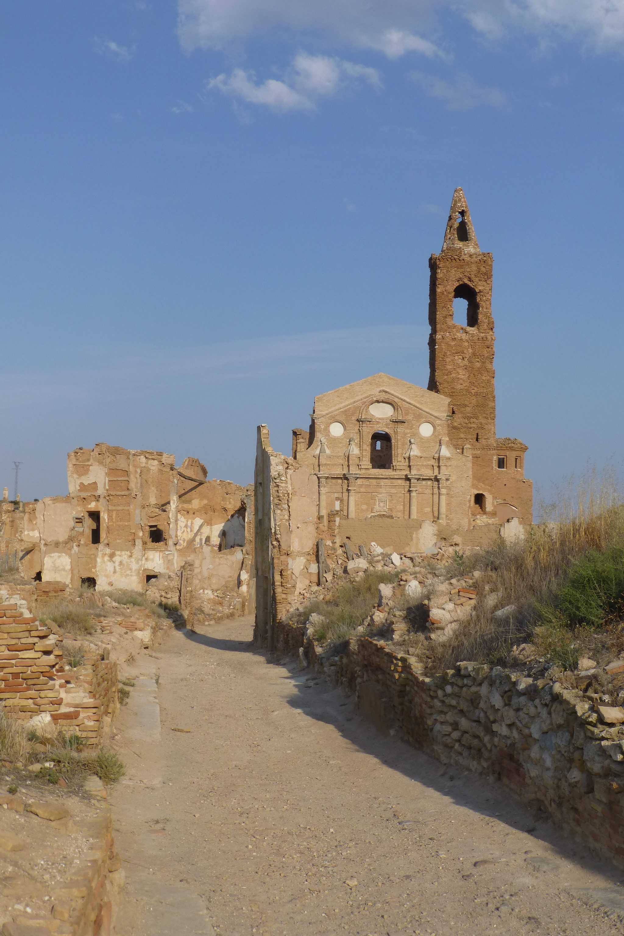 Vista de la iglesia en ruinas del San Martín de Tours en el pueblo viejo de Belchite en Zaragoza, Aragón (España). Dejado sin reconstruir después de la Guerra Civil Española (1936-1939).